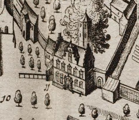 Het Doelhuis met daarvoor het doelenterrein te Schoonhoven, detail kaart van Schoonhoven